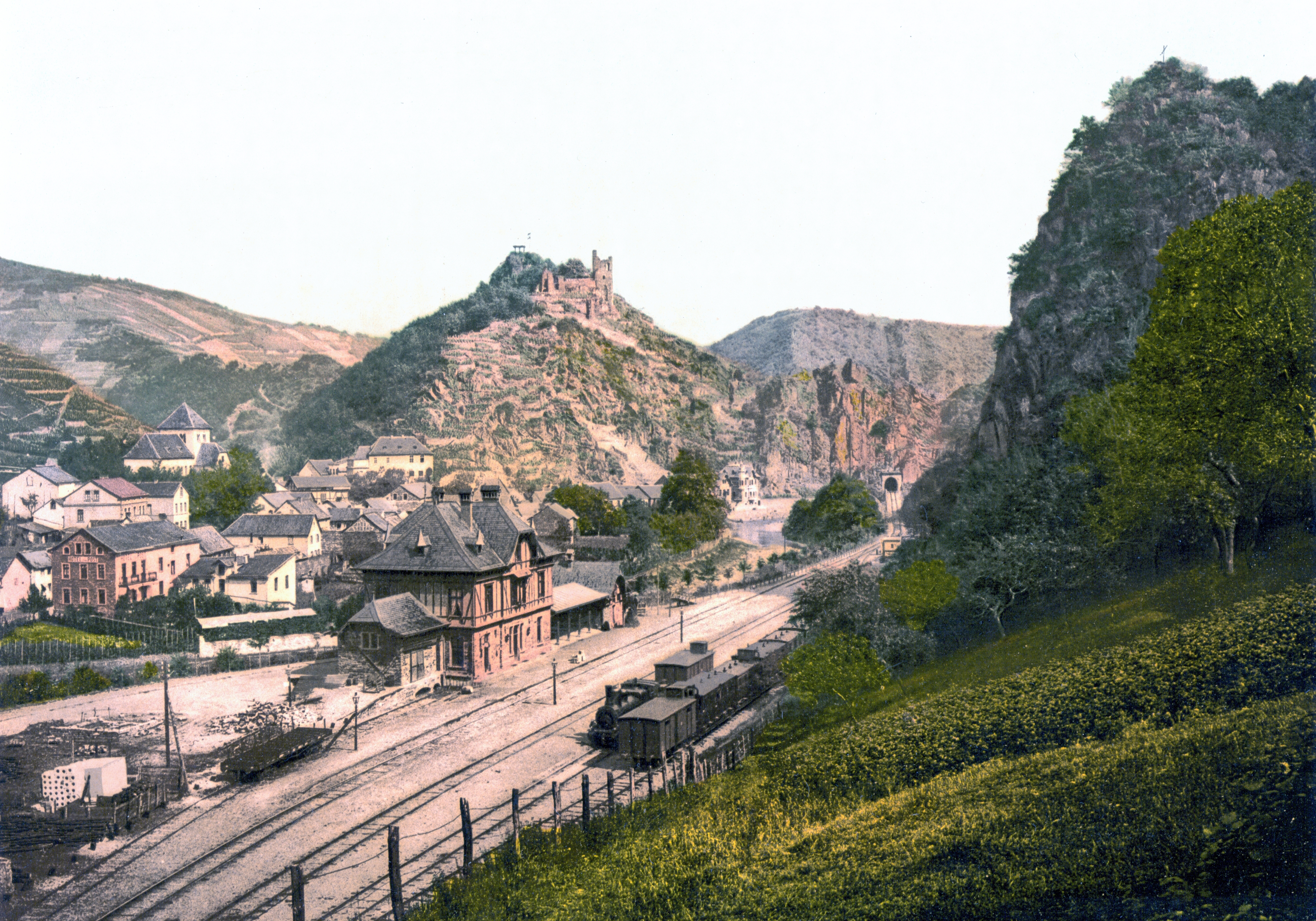 Altenahr